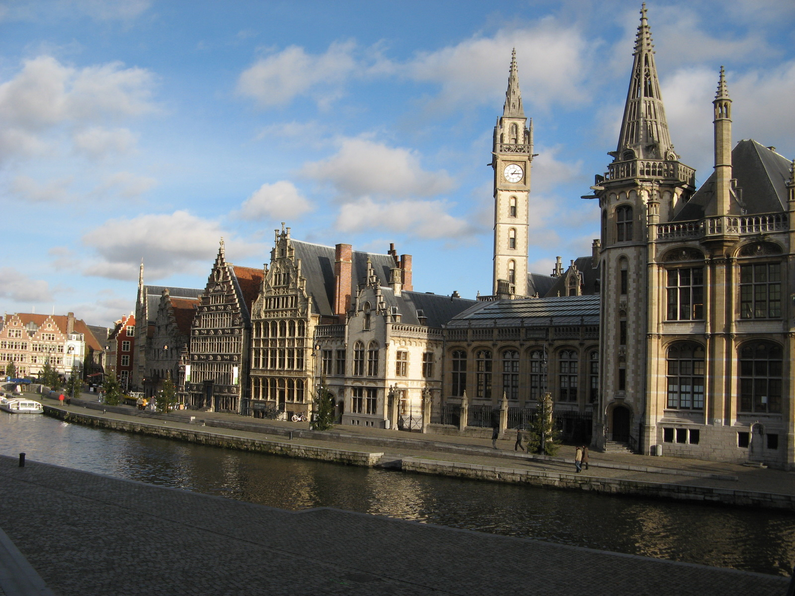 Ghent